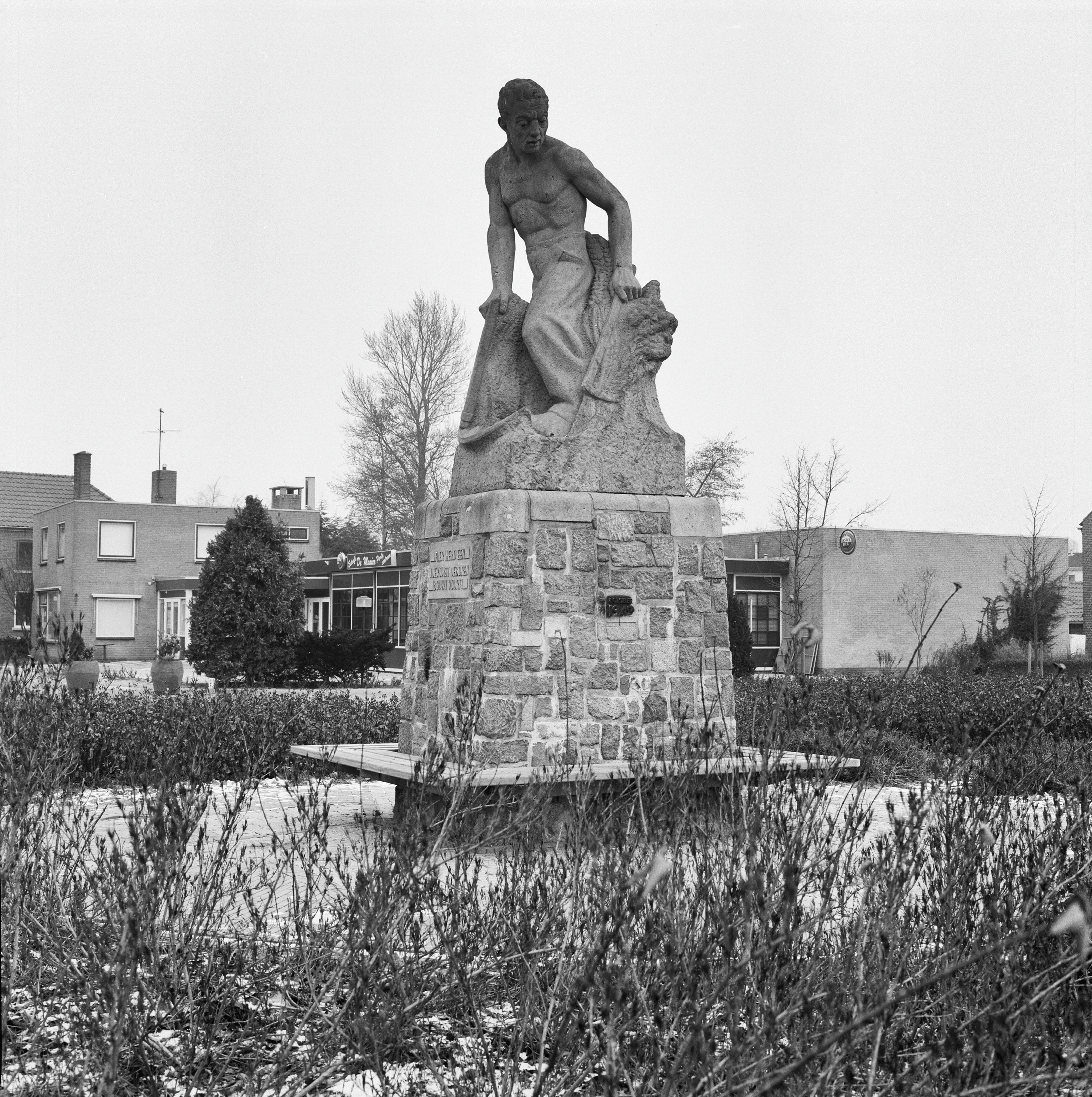 GEMEENTEHUIS: Exterieur BEELD 'DE MAAIER' (THEO VAN REIJN, 1942) OVERZICHT (opmerking: BOEK: "BEELD OP HET WERK")